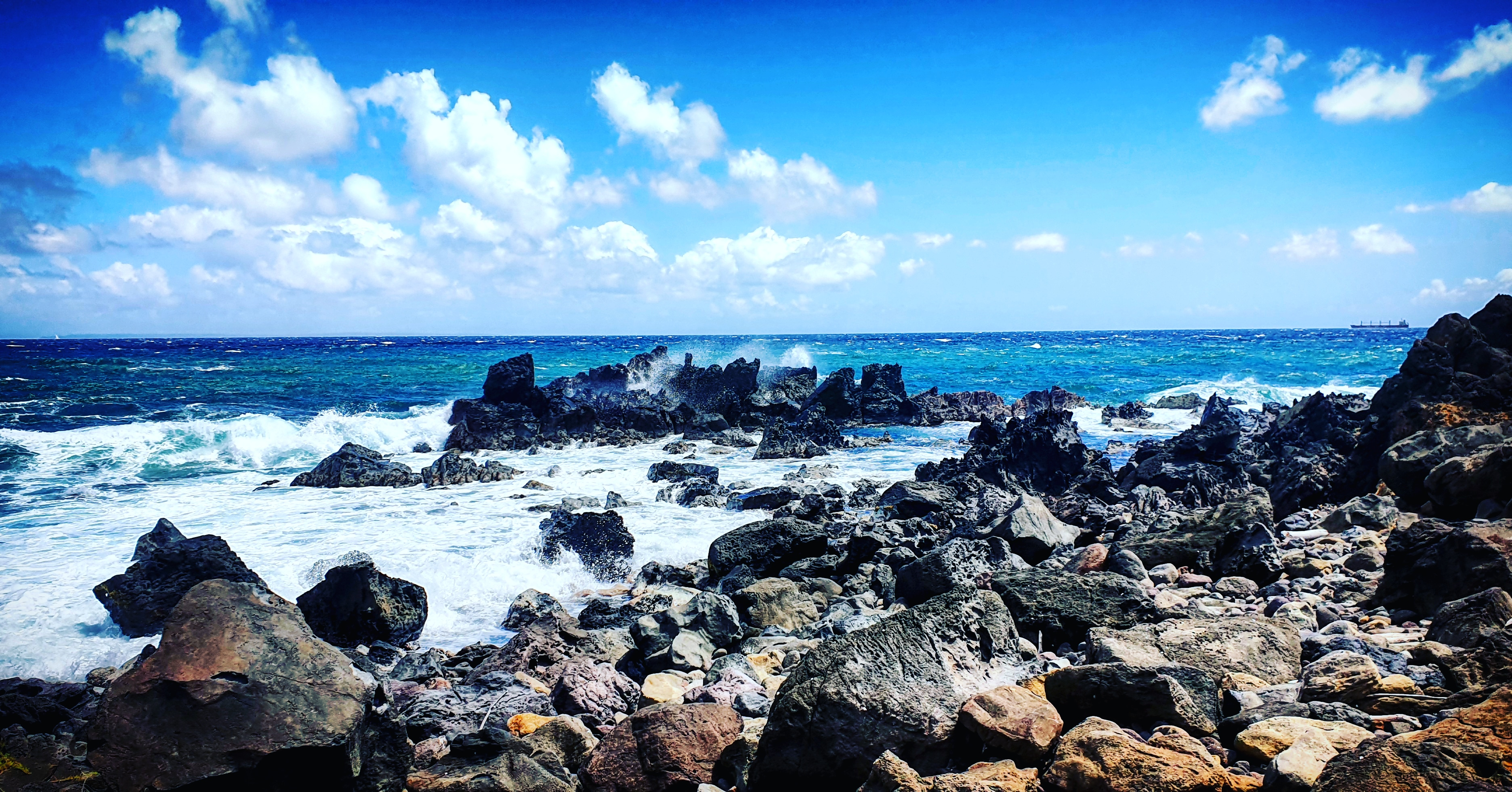 Porte d'enfer Guadeloupe